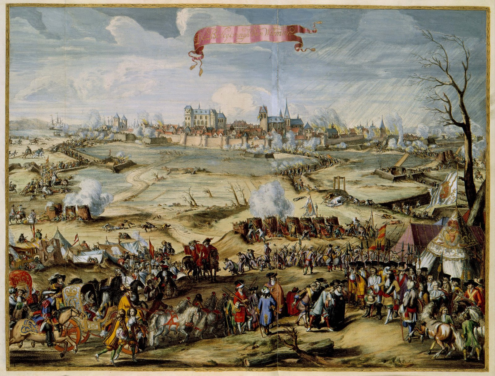 Siege of Wismar (1675)